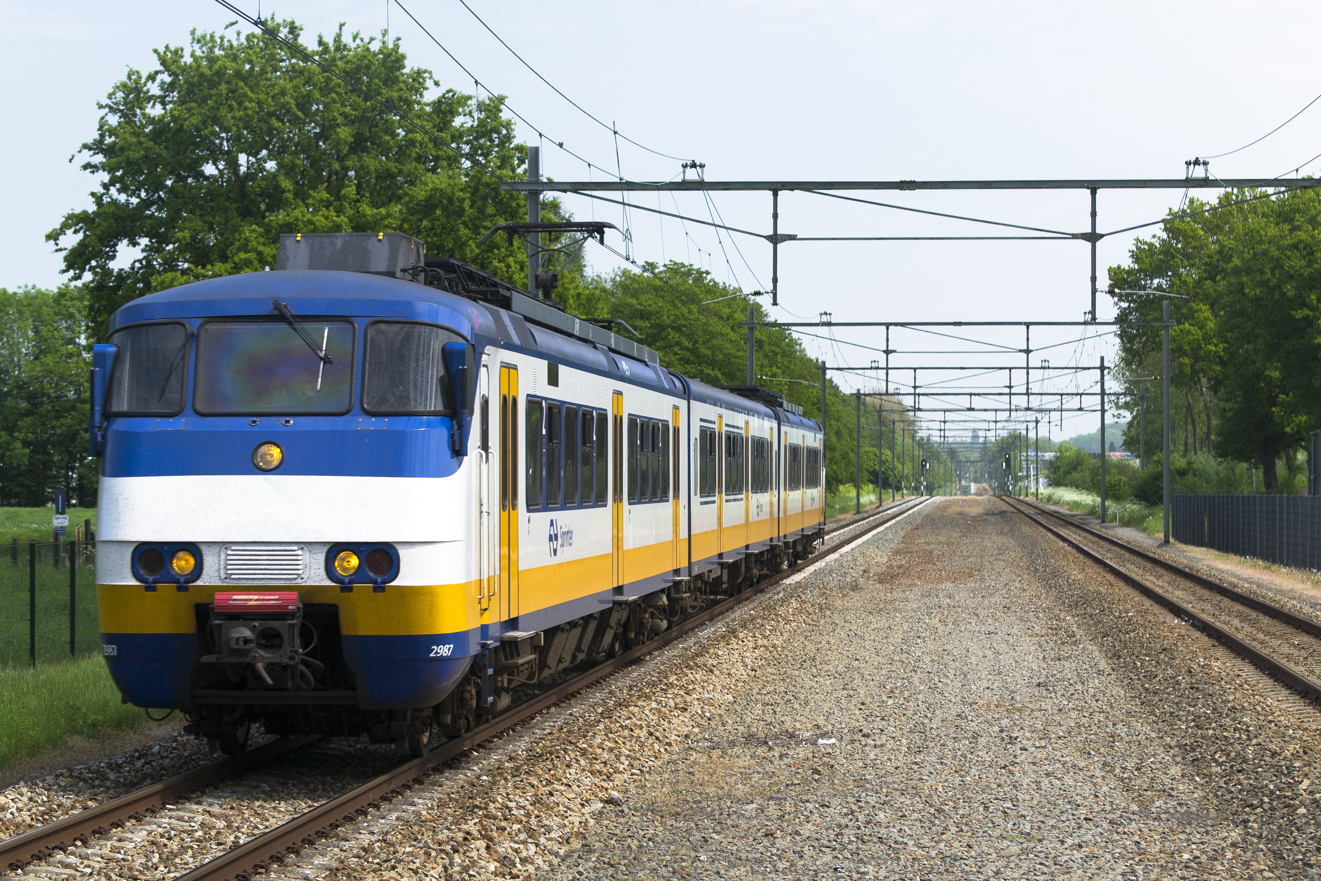 SGMm stel 2987 loopt op 19 mei 2013 met trein 6956 binnen op Station Spaubeek.